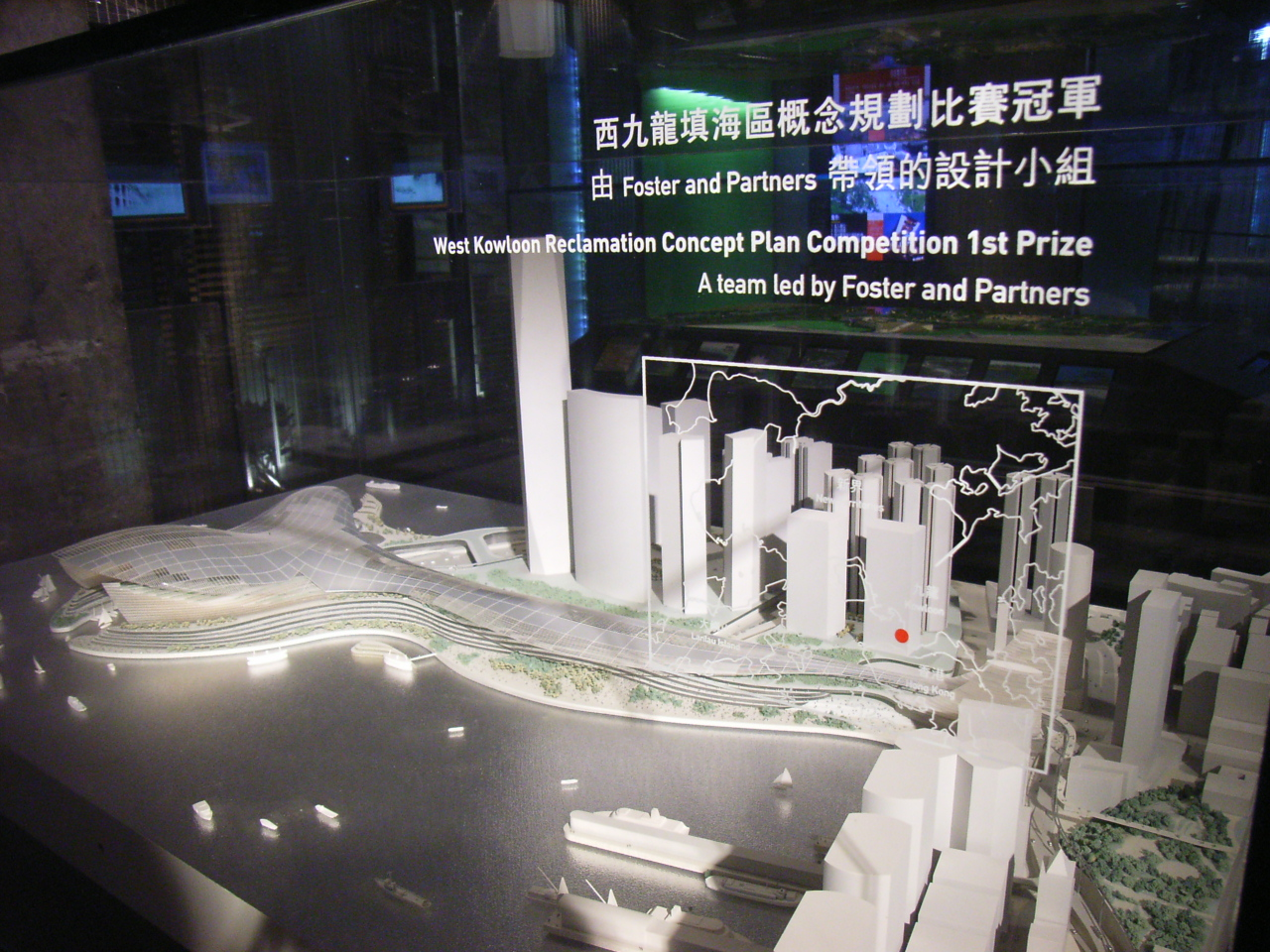 香港國際機場的建築師zh:諾曼·福士特(Foster & Partners)，流線型zh:西九龍 "天幕"